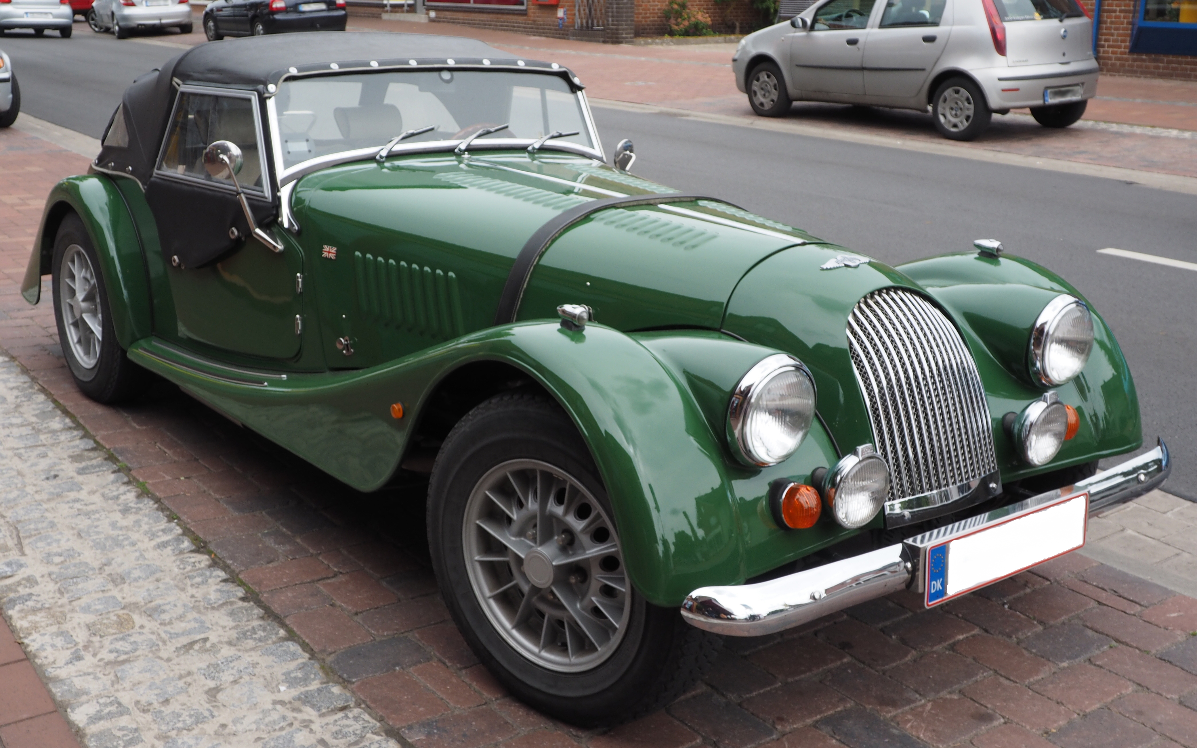 Morgan +8